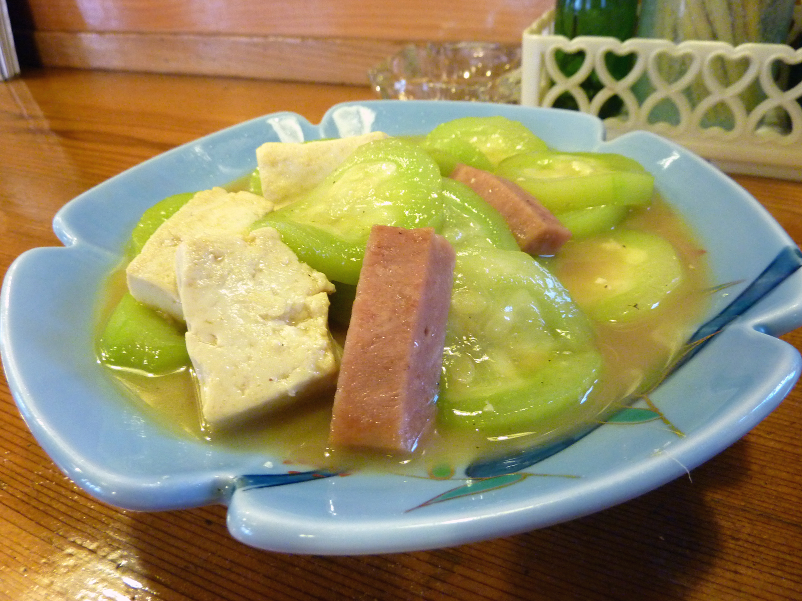 ナーベラーンブシー（沖縄県石垣市）